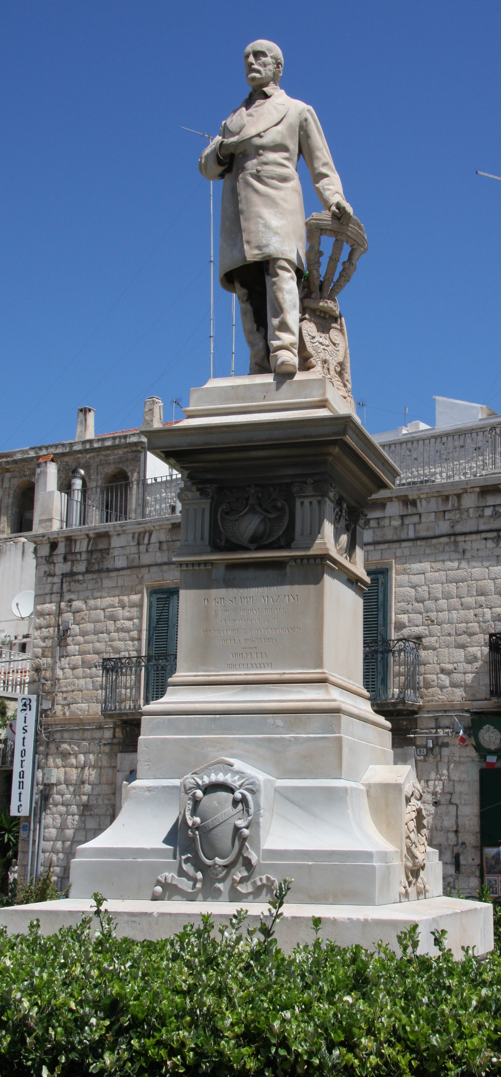 Statue de Mazzini à Molfetta